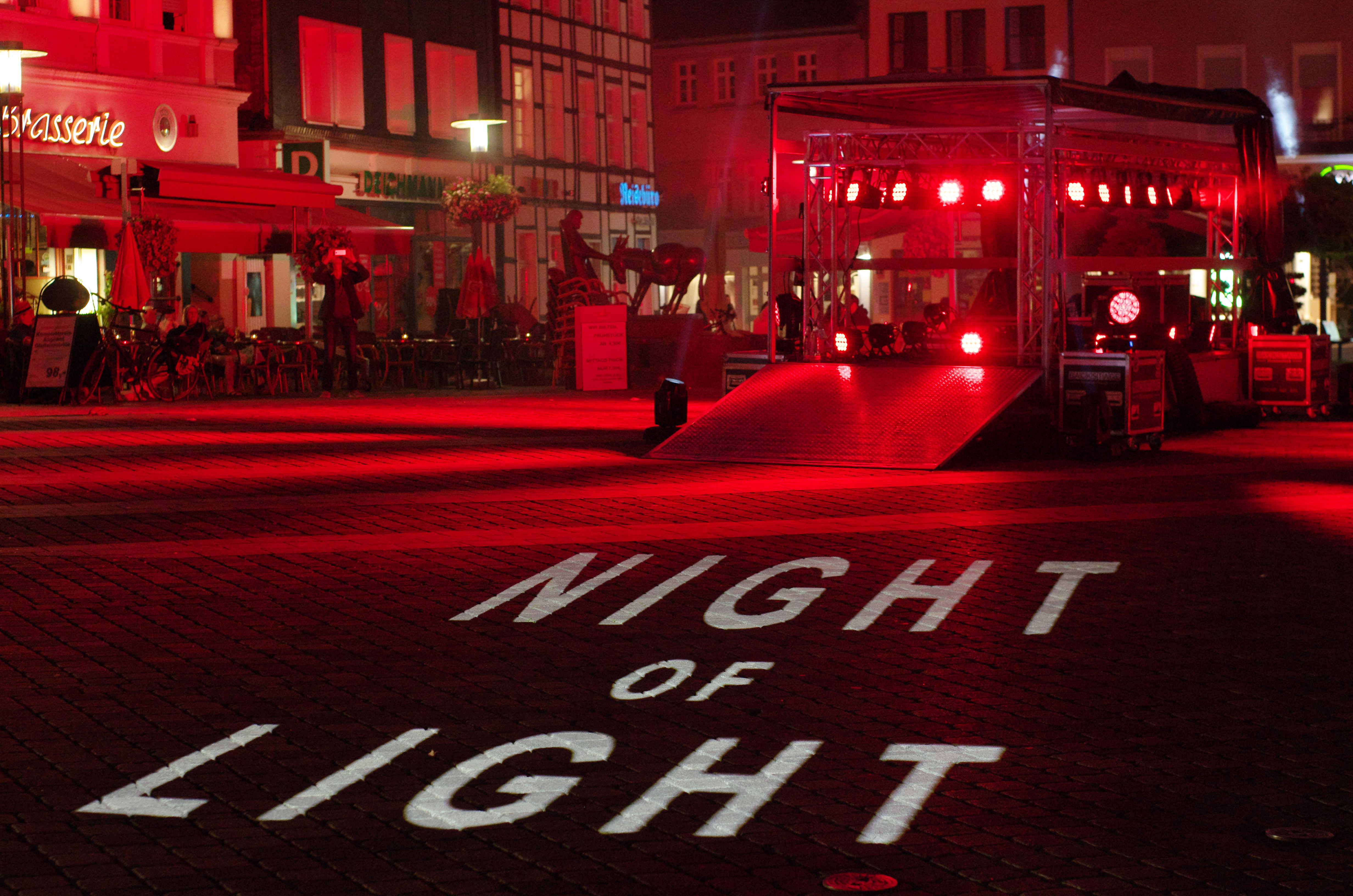 Lichtaktion "Night of Light" auf dem Alten Markt in Unna